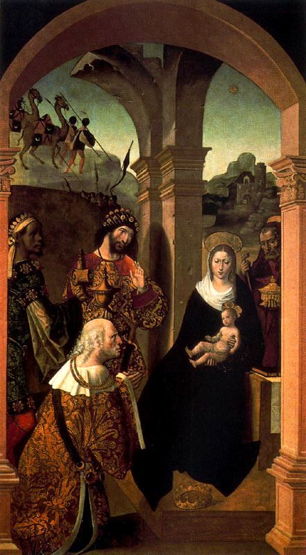 Esta obra, que está colocada en el muro izquierdo de la Sacristía de los Cálices de la catedral de Sevilla, (España), fue pintada por Alejo Fernandez a principios del siglo XVI.